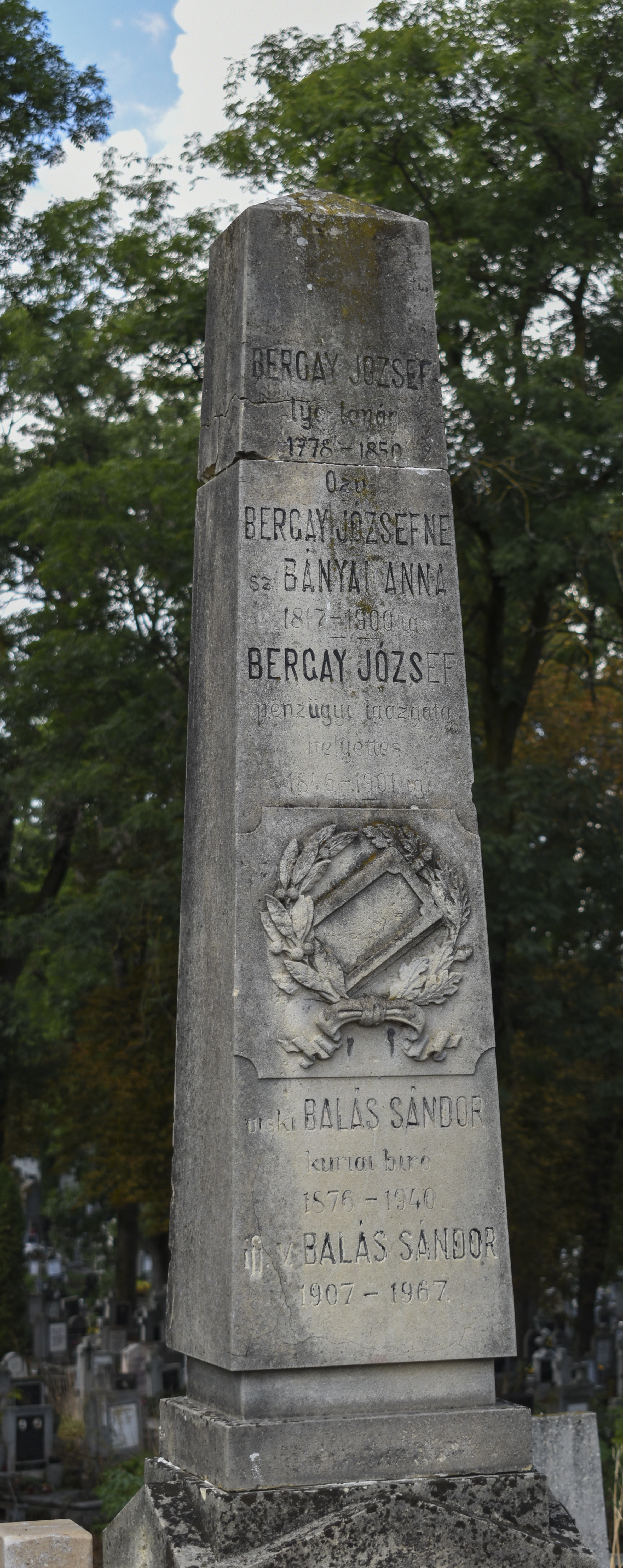 Mormânt Bergay József (1778-1850) 323